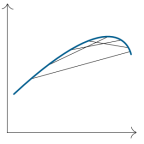 Concave function שורטט בעזרת Sodipodi על־ידי עבדכם הנאמן.